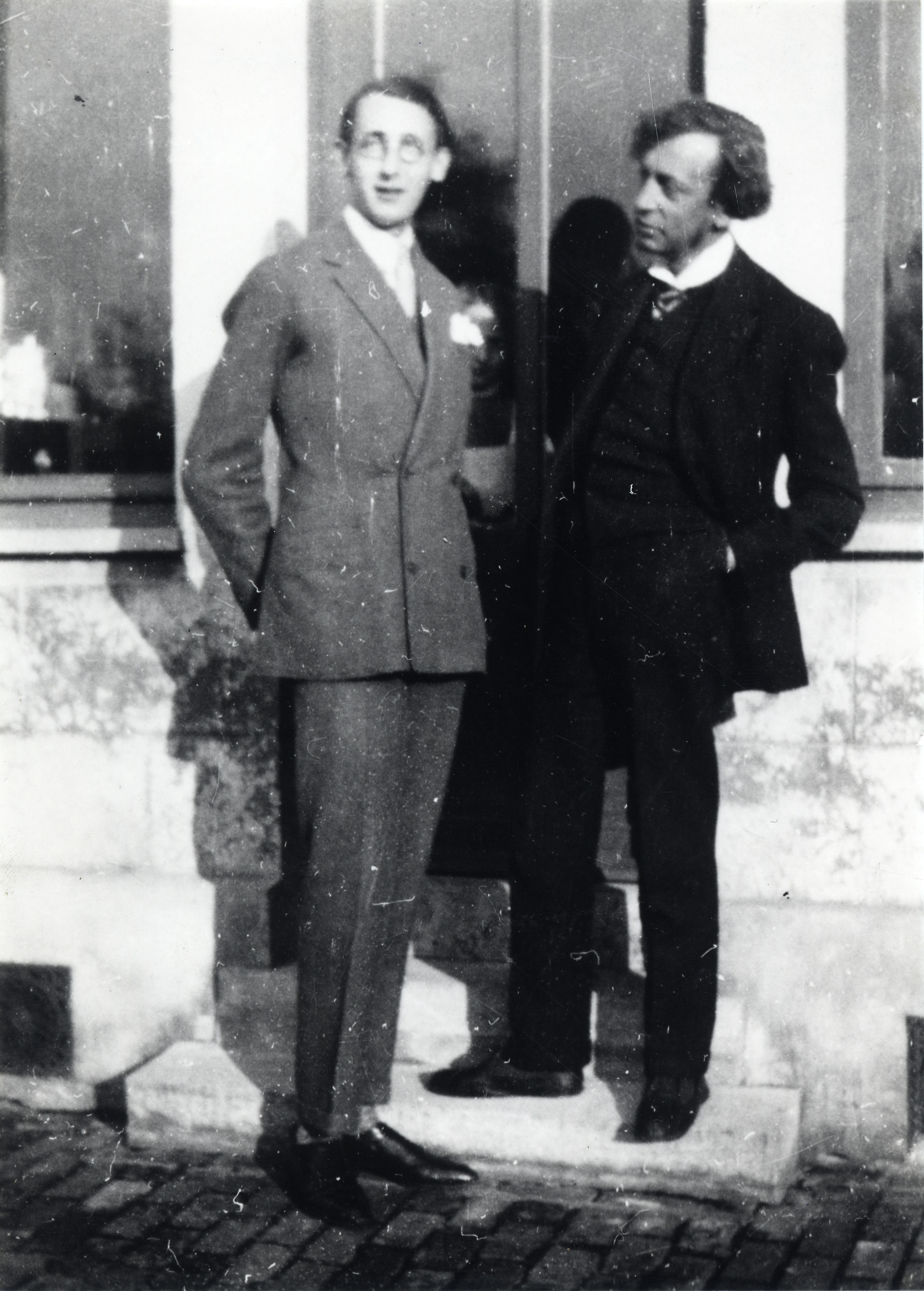 Paul van de Woestijne (1905-1963) (links) en zijn vader Karel van de Woestijne (1878-1929)